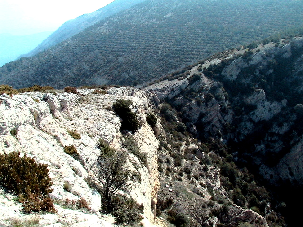 Pas de la Portella Blanca, a la carena del Montsec de Rúbies (Pallars Jussà - Catalunya)